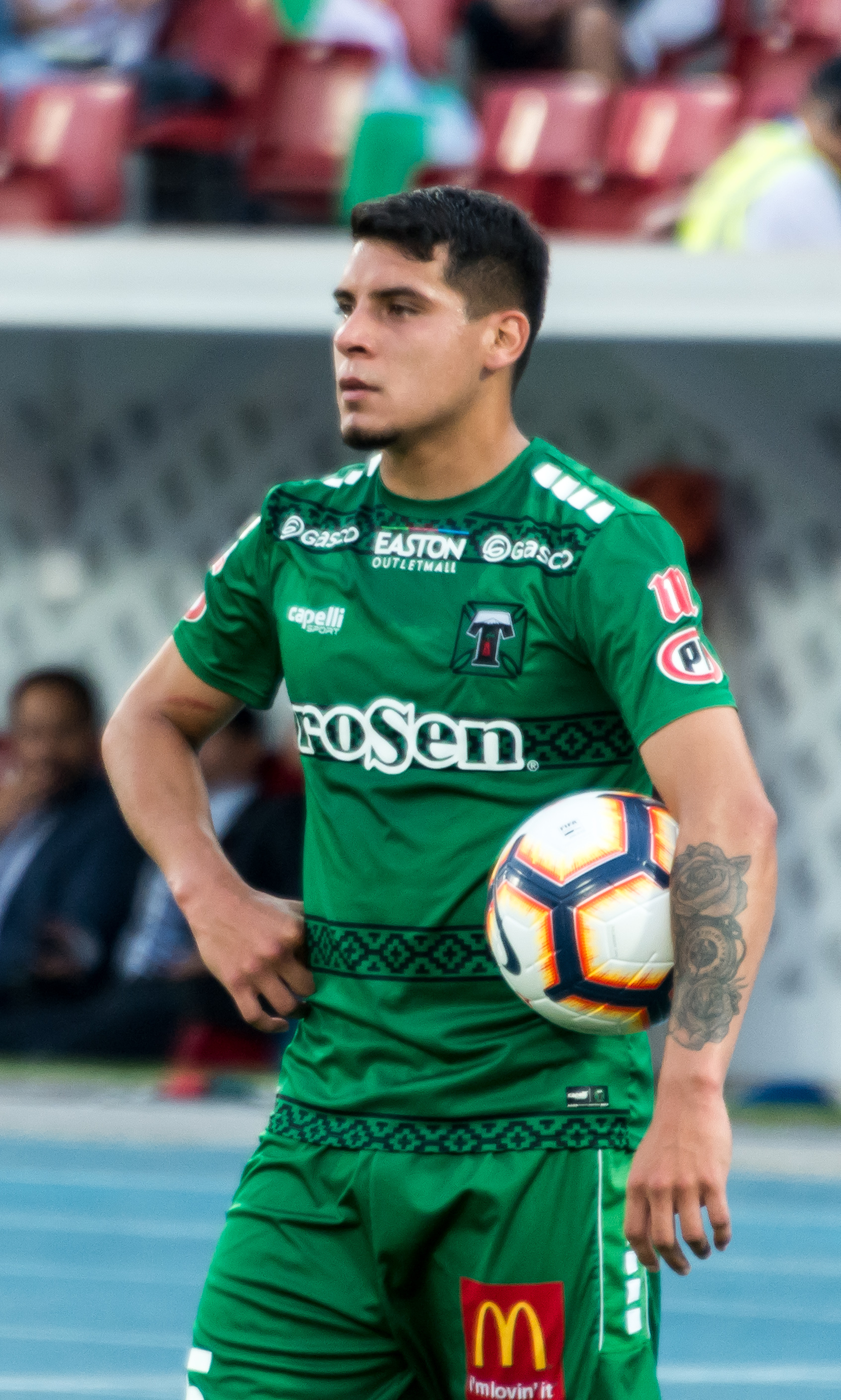 Deportes La Serena v Deportes Temuco, Estadio Nacional de Chile, Ñuñoa, Santiago, Región Metropolitana, Chile